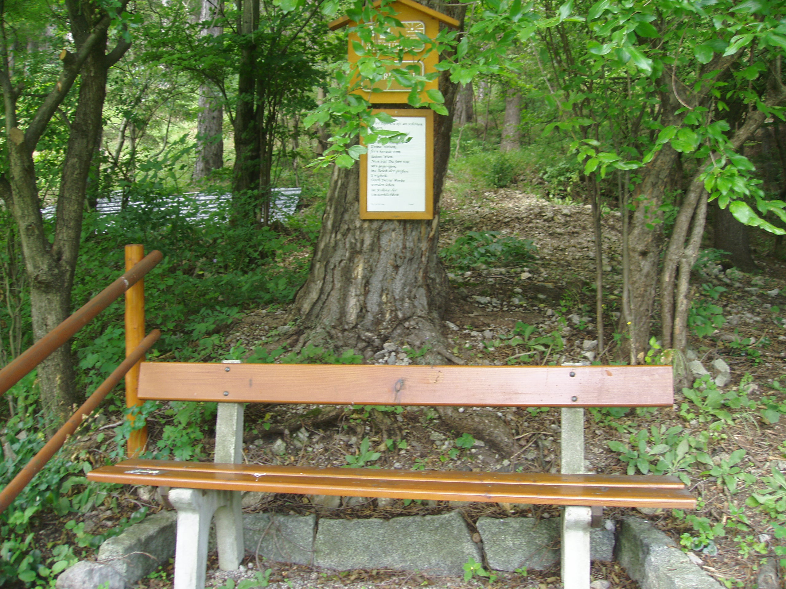 Die Ziehrerbank in der Marktgemeinde Puchberg am Schneeberg im südlichen Niederösterreich, die nach Carl Michael Ziehrer benannt wurde, der im Sommer 1915 dort täglich gesessen ist.